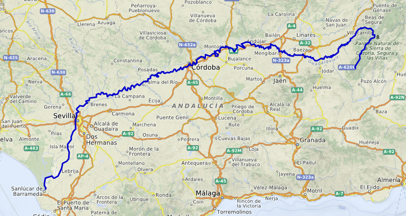 carte réalisée sur umap This map may be incomplete, and may contain errors. Don't rely solely on it for navigation.